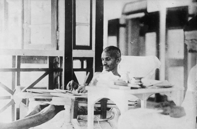 Ghandi, der grosse Führer der indischen Freiheitsbewegung ist in der Haft in den Hungerstreik getreten! Der indische Freiheitskämpfer Ghandi, bei der Arbeit.